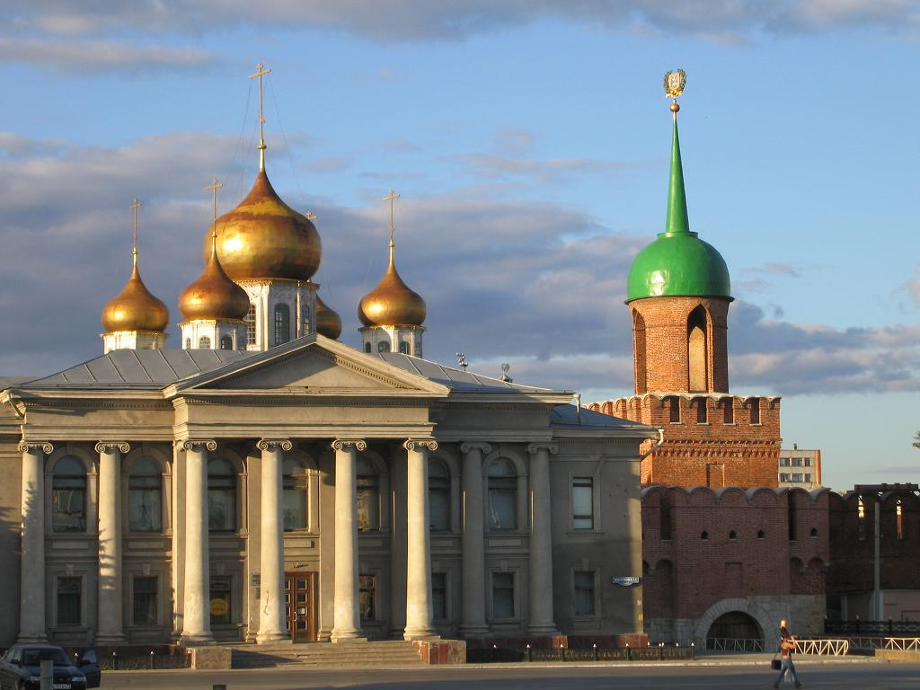 Одоевская башня Тульского кремля и Музей самоваров